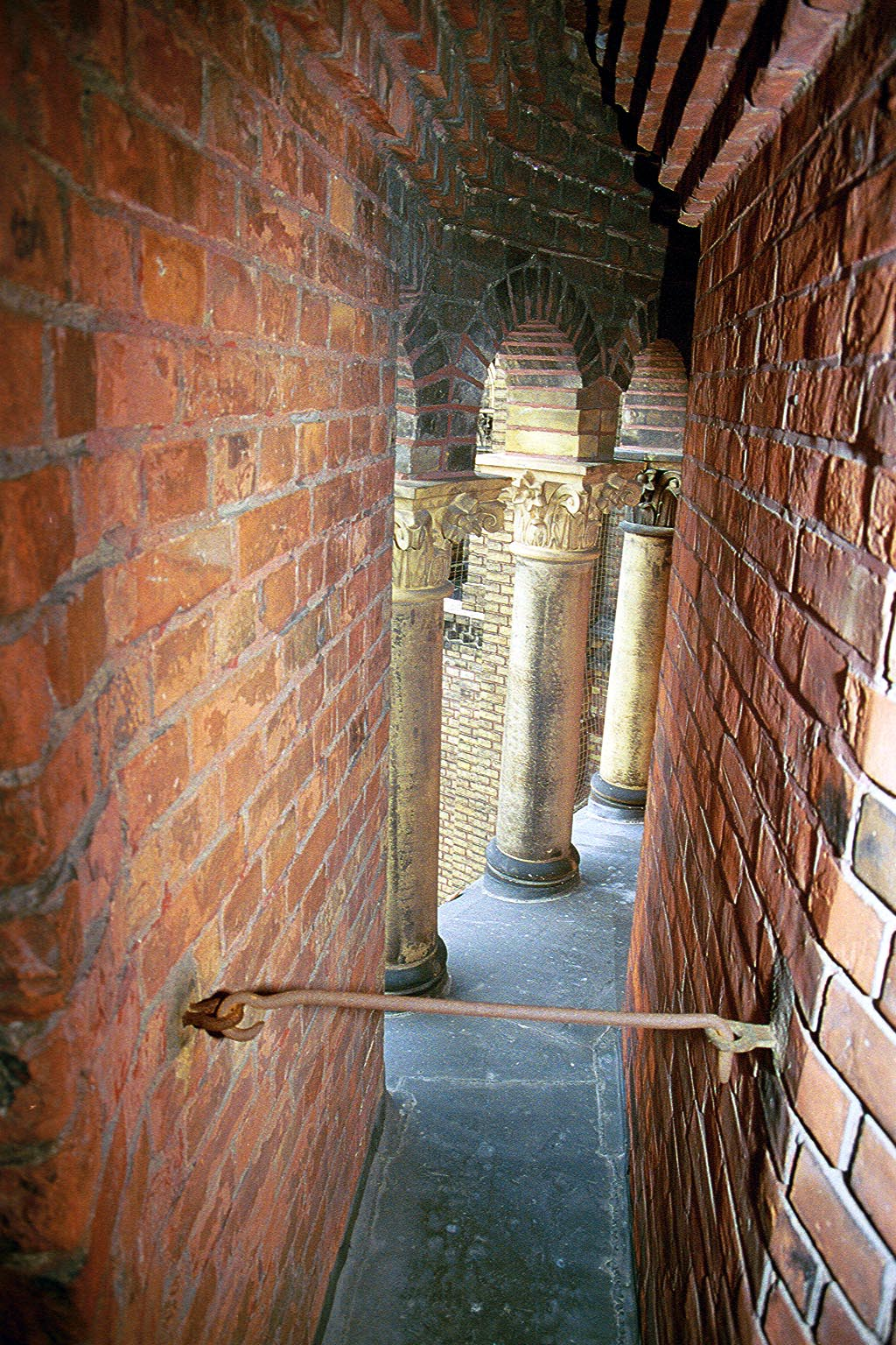 Berlin, Zionskirche, Blick aus der Turmtreppe in die Galerie über dem Fendter über dem Eingang